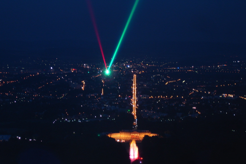 Foto von der Laserinstallation Laserscape in Kassel aufgenommen im Herbst 2006